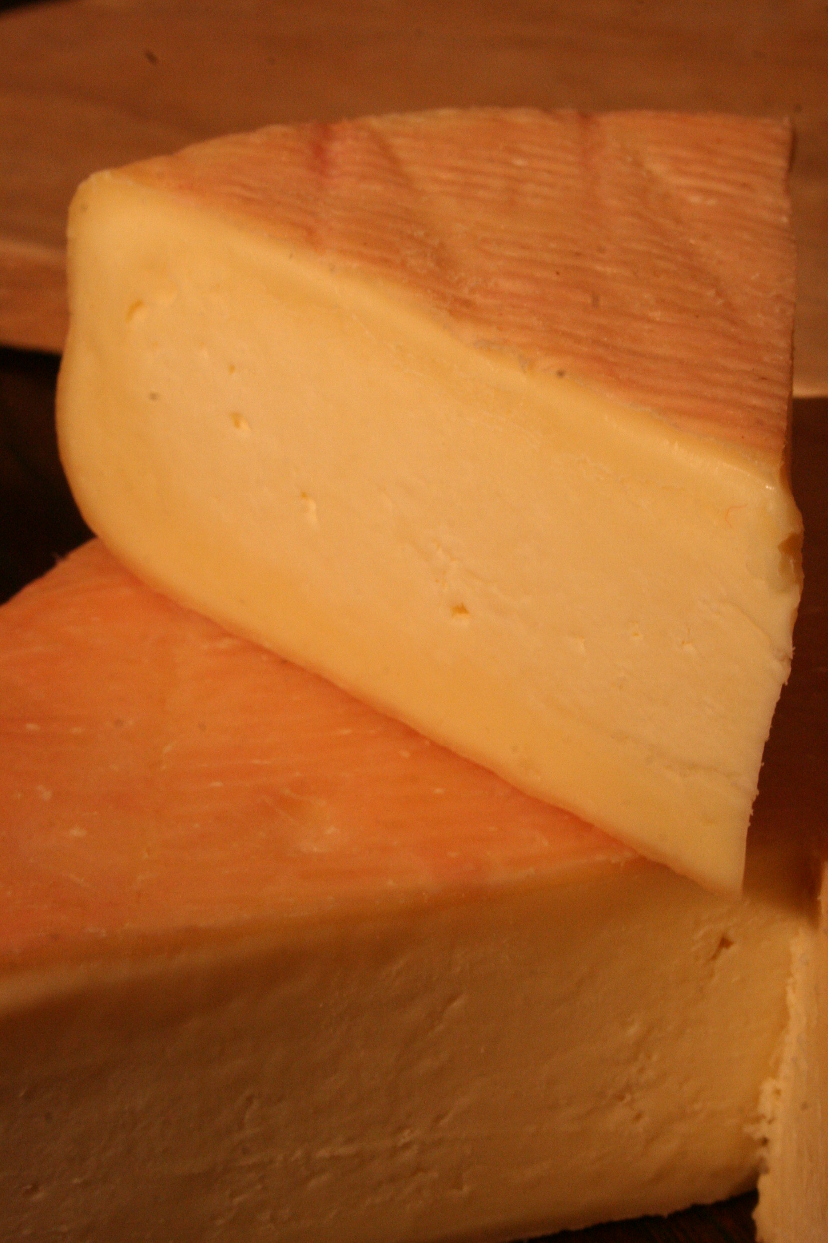 Tranche de Munster